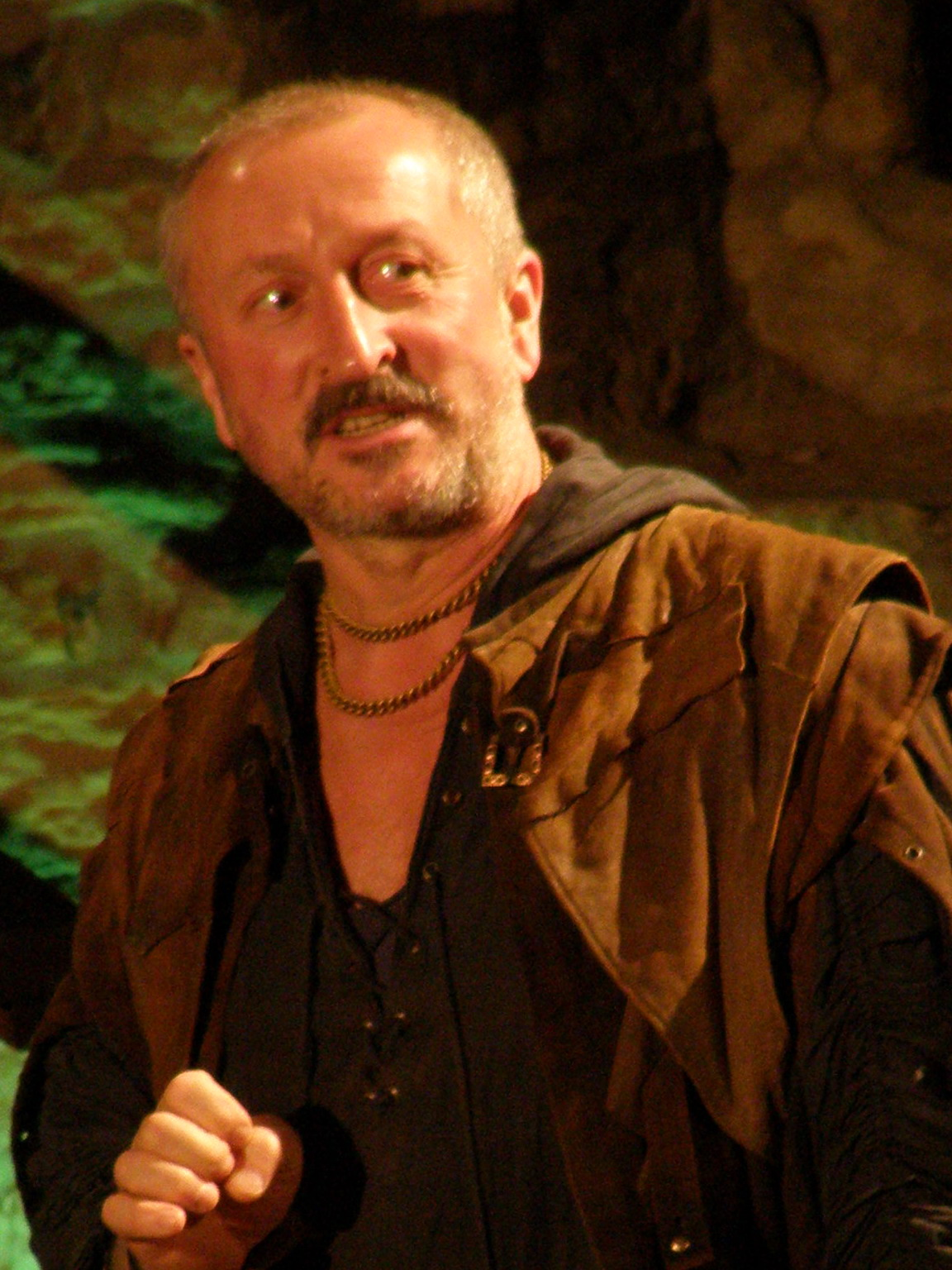 Oldřich Navrátil při Letních Shakespearovských slavnostech na Pražském hradě, 2007